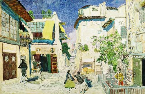 Улица Севильи. 1908 Эскизы декораций к опере Ж. Бизе "Кармен" Государственный Русский музей